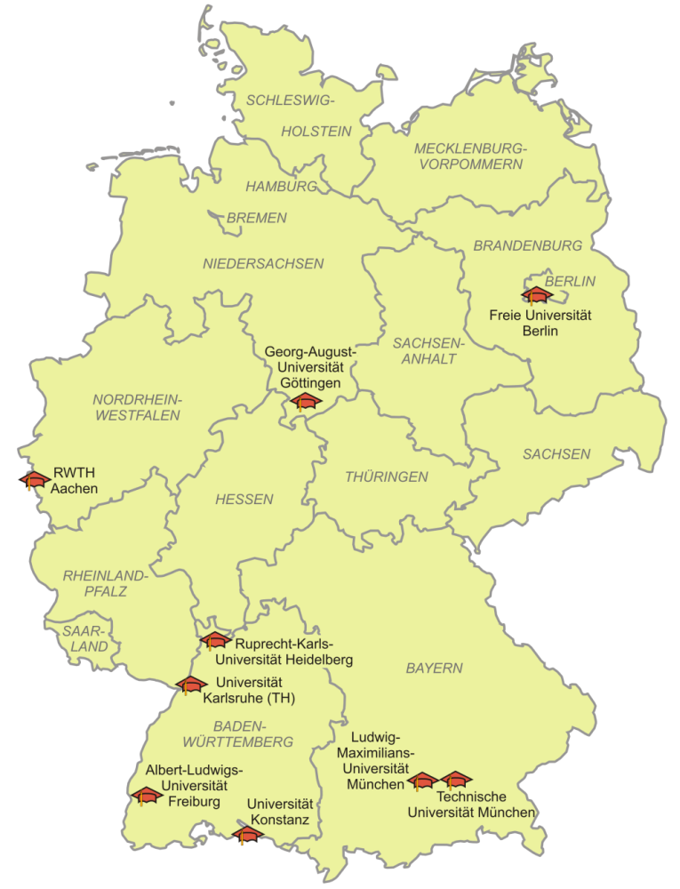 Eliteuniversitäten in Deutschland, Stand: Oktober 2007